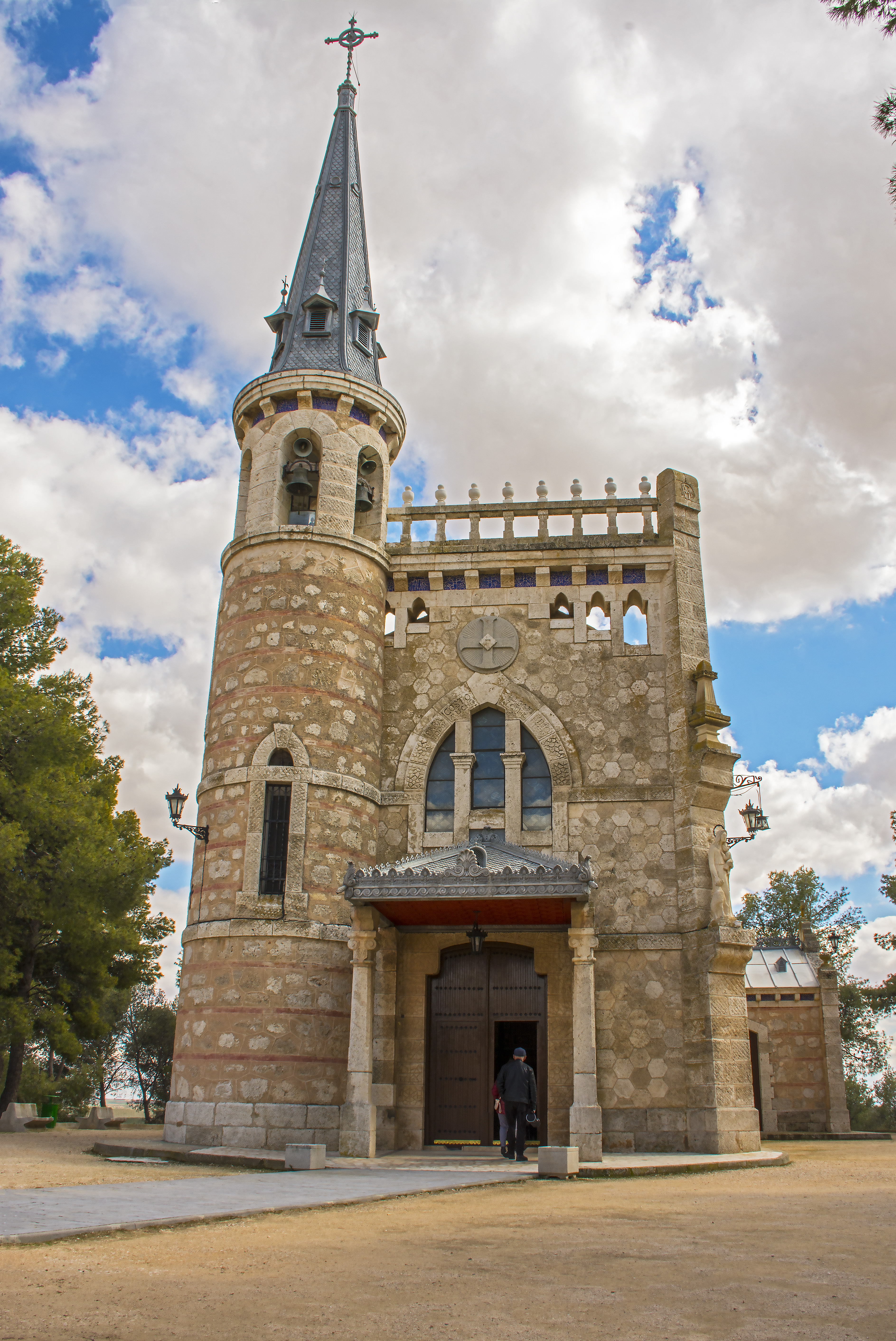 Ermita de la Virgen del Rosario de Pastores, Huerta de Valdecarábanos, Toledo, España